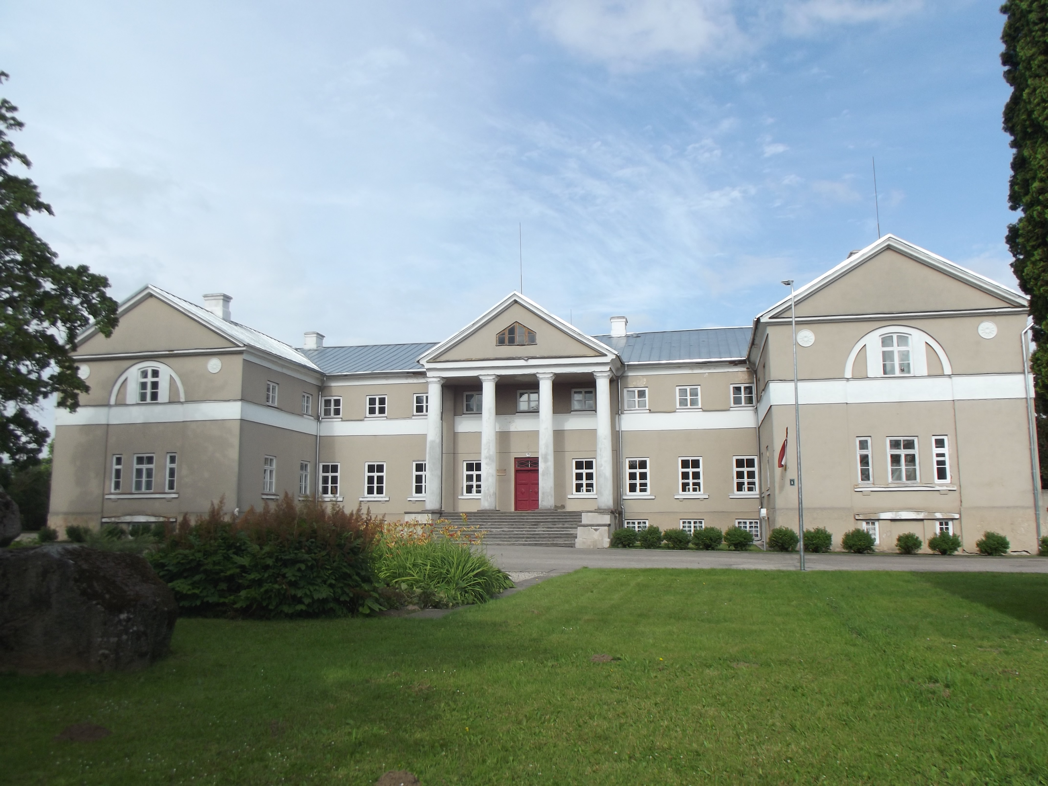 Pastendes muiža